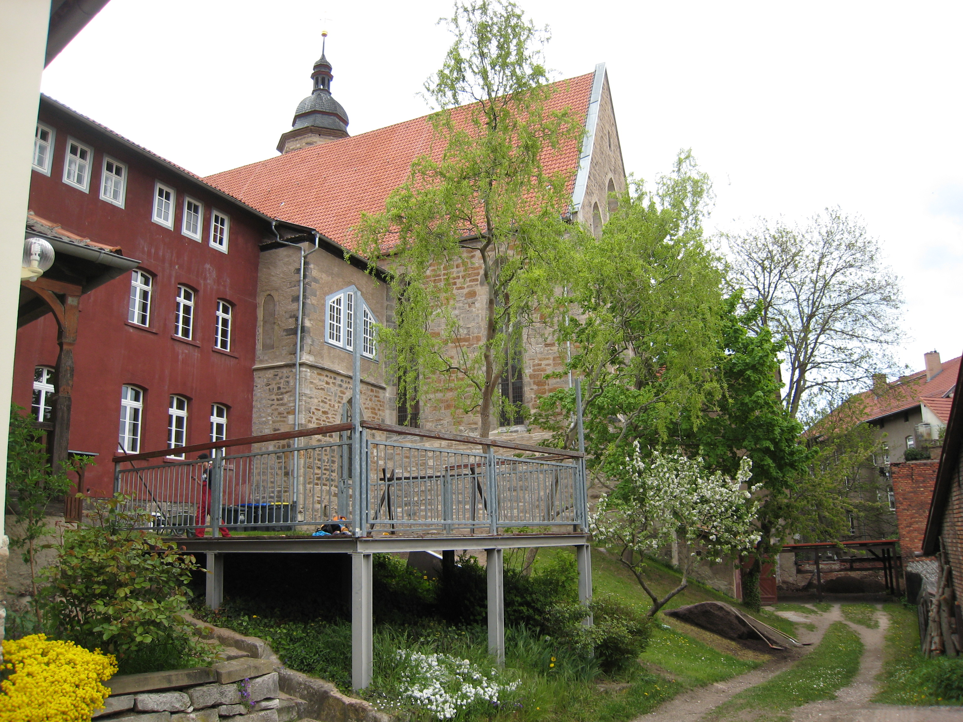 Ehemaliges Franziskanerkloster und Franziskanerkirche (Obere Kirche) in Arnstadt (Photoaufnahme von: Neue Gasse)